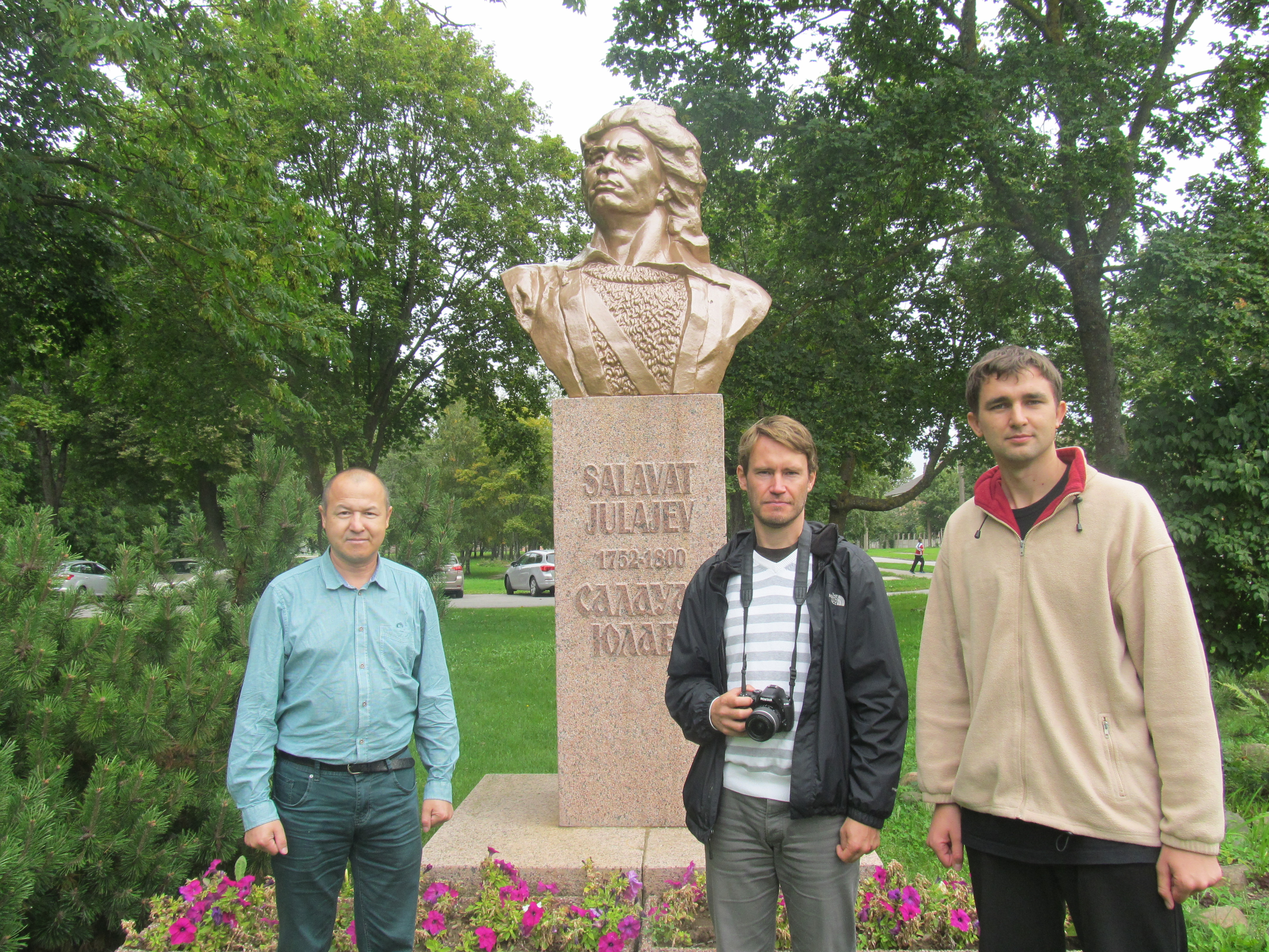 Памятник Салавату Юлаеву, Эстония